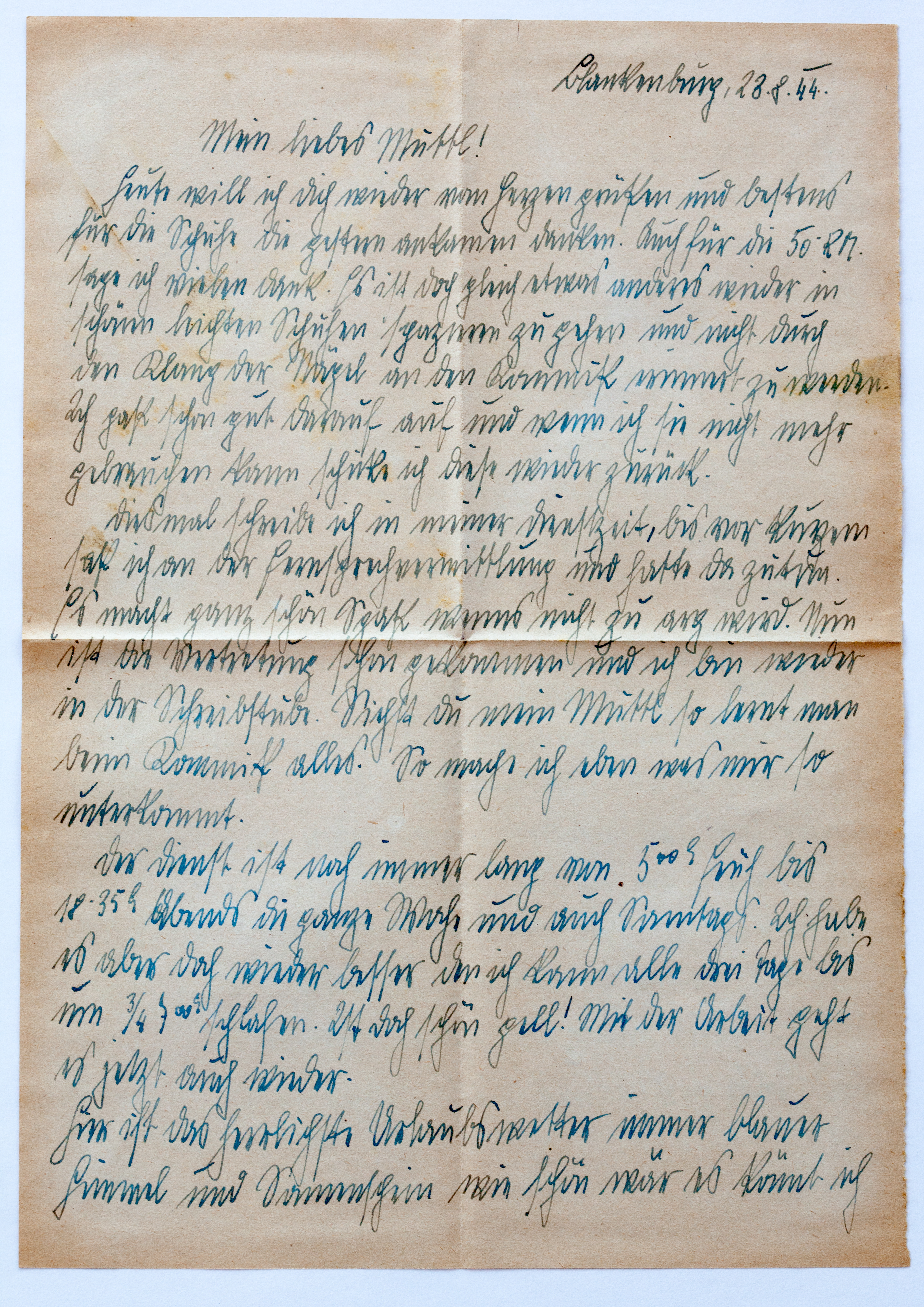 Feldpostbriefe von Hans Koch, Wien, 2. Weltkrieg, Ostfront, 1922-1945 vorheriger Brief (1944-08-20) Brief Nr. 273 (1944-08-23) nächster Brief (1944-08-28) Briefumschlag: Vorderseite Rückseite Brief: Seite 1 Seite 2 TEXT Blankenburg, 23. 8. 44. Mein liebes Muttl! Heute will ich Dich wieder vom Herzen grüßen und bestens für die Schuhe die gestern ankamen danken. Auch für die 50. RM. sage ich vielen Dank. Es ist doch gleich etwas anderes wieder in schönen leichten Schuhen spazieren zu gehen und nicht durch den Klang der Nägel an den Kommiß erinnert zu werden. Ich paß schon gut darauf auf und wenn ich sie nicht mehr gebrauchen kann schicke ich diese wieder zurück. Diesmal schreibe ich in meiner Dienstzeit, bis vor kurzem saß ich an der Fernsprechvermittlung und hatte da zutun. Es macht ganz schön Spaß wenns nicht zu arg wird. Nun ist die Vertretung schon gekommen und ich bin wider in der Schreibstube. Siehst Du mein Muttl so lernt man beim Kommiß alles. So mache ich eben was mir so unterkommt. Der Dienst ist noch immer lang von 5.00 h früh bis 18.35 h Abends die ganze Woche und auch Sonntags. Ich habe es aber doch wieder besser den ich kann alle drei Tage bis um ³/₄7.00 h schlafen. Ist doch schön gell! Mit der Arbeit geht es jetzt auch wieder. Hier ist das herrlichste Urlaubswetter immer blauer Himmel und Sonnenschein wie schön wär es könnte ich [jetzt daheim sein.]